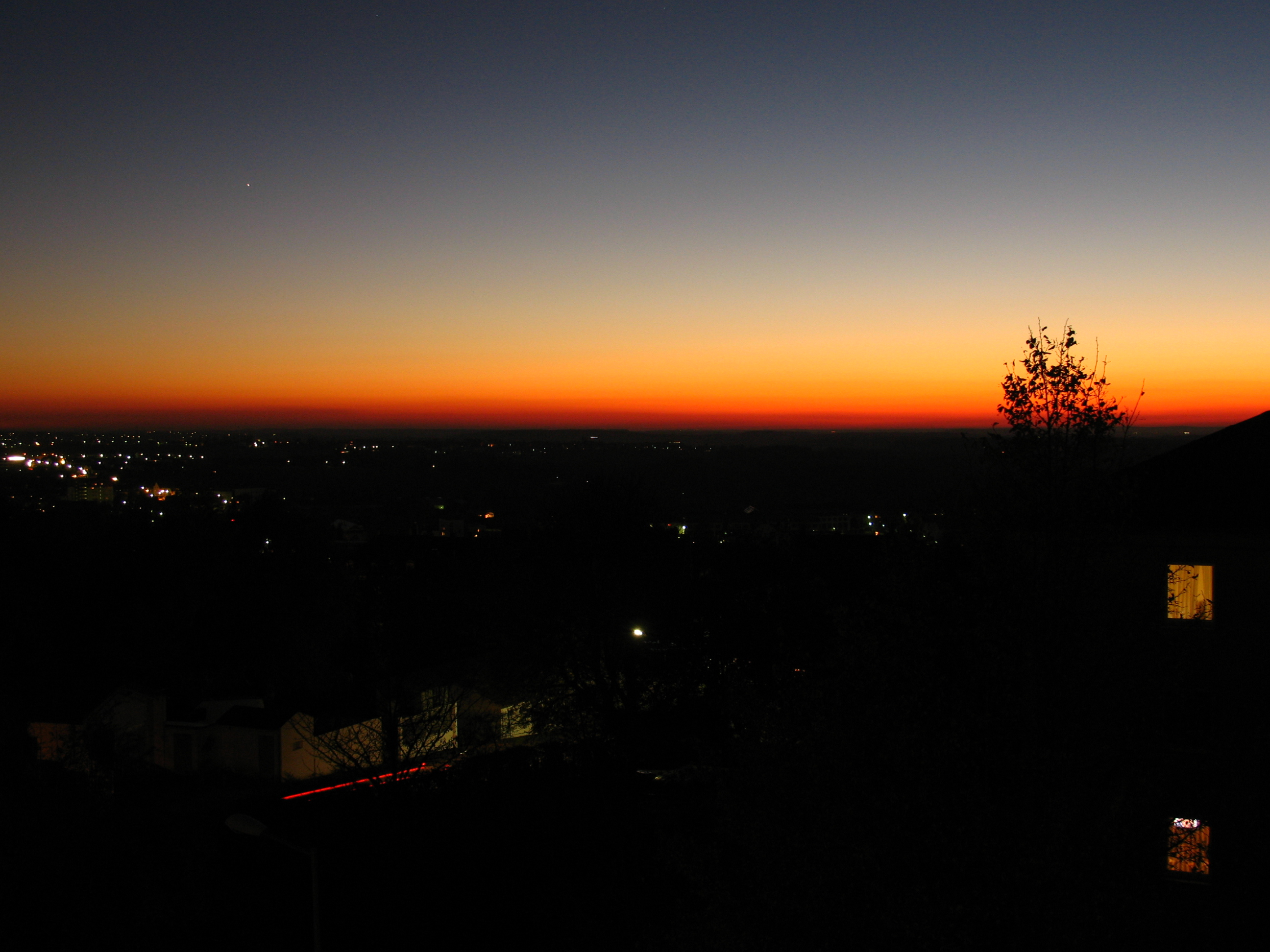 Sonnenuntergang in Pirmasens. gesehen von der Husterhöhe in Richtung Innenstadt